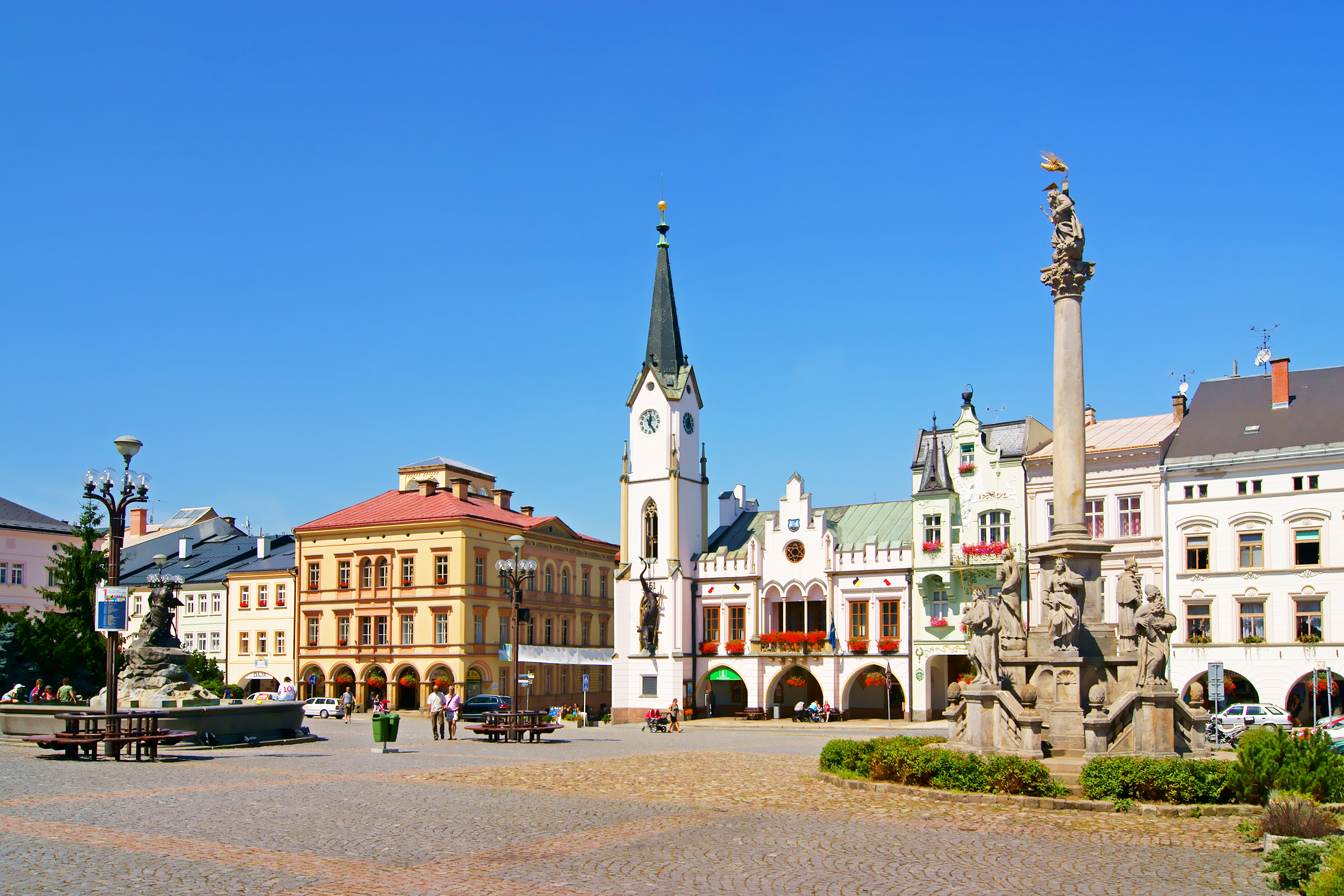 Krakonošovo náměstí v Trutnově. Vlevo Krakonošova kašna, uprostřed novogotická stará radnice, vpravo barokní sloup Nejsvětější Trojice.